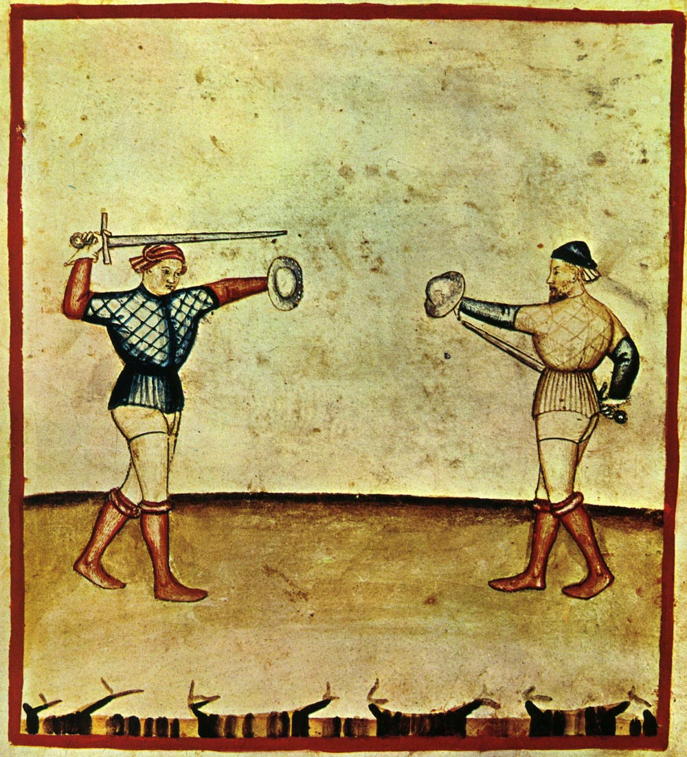 Tacuina sanitatis (XIV century) 8-svaghi, lotta,Taccuino Sanitatis, Casanatense 4182.